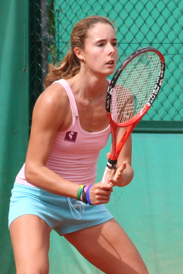 Alizé Cornet à l'entraînement.